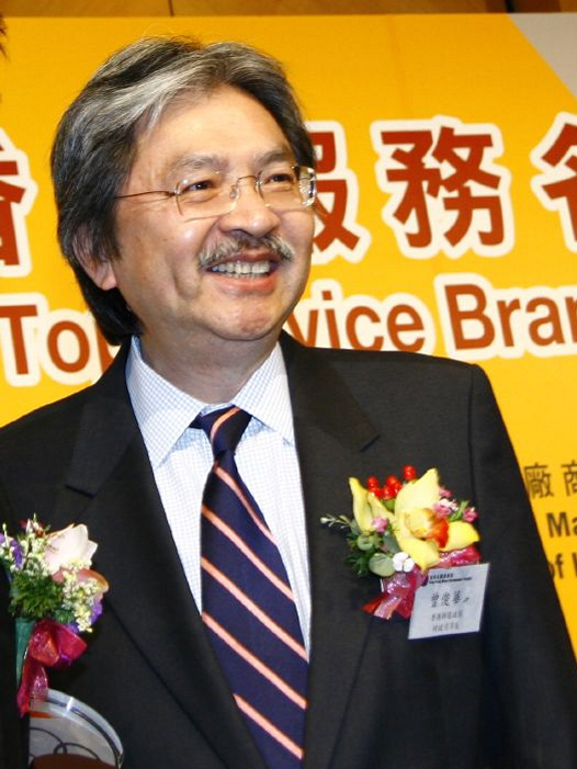 John Tsang